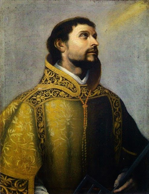 Autor: Bartolome Esteban Murillo (1617-1682) Titulo: San Lorenzo Dimensiones: 83x63 Soporte: Óleo sobre tela. Siglo XVII